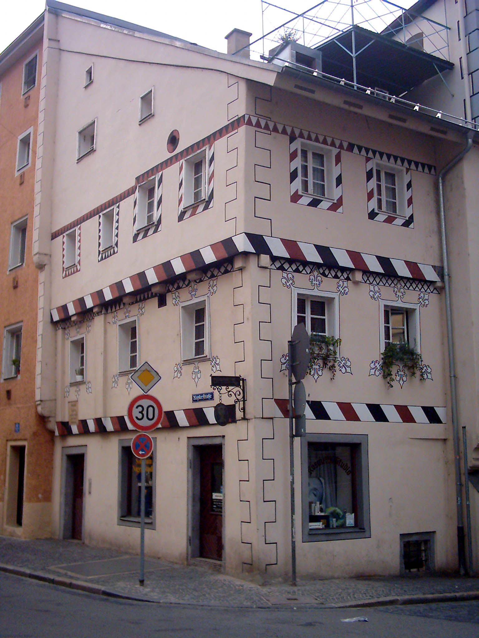 Regensburg (Bayern): Das Wohnhaus des Astronomen Johannes Kepler und seiner Familie von 1626-1628 in der nach ihm benannten Keplerstraße (vom Fischmarkt aus fotografiert)